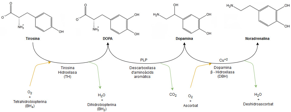 Diagrama horitzontal de la síntesi de la noradrenalina. De color taronja els reactius que intervenen i de color verd els productes que en resulten.